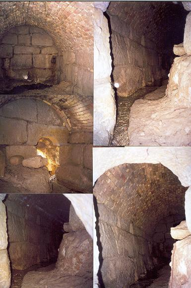 José Mª Bescós Pérez para Wikipedia right|thumb|Fuente y lavadero right|thumb|Abrevadero para las bestias La Fuente de los tres caños, en Ayerbe (Huesca), sirvió para abastecer agua, de boca, a la Villa desde tiempos remotos hasta el Siglo XX. Aunque la parte exterior es obra de principios del siglo XIX, parece que el interior es algo anterior. Es un manantial perpetuo de agua fresca en verano y templada en invierno, cualidad esta última que se aprovechó en el siglo XIX para construir un importante lavadero público. También contó con abrevadero para las bestias.